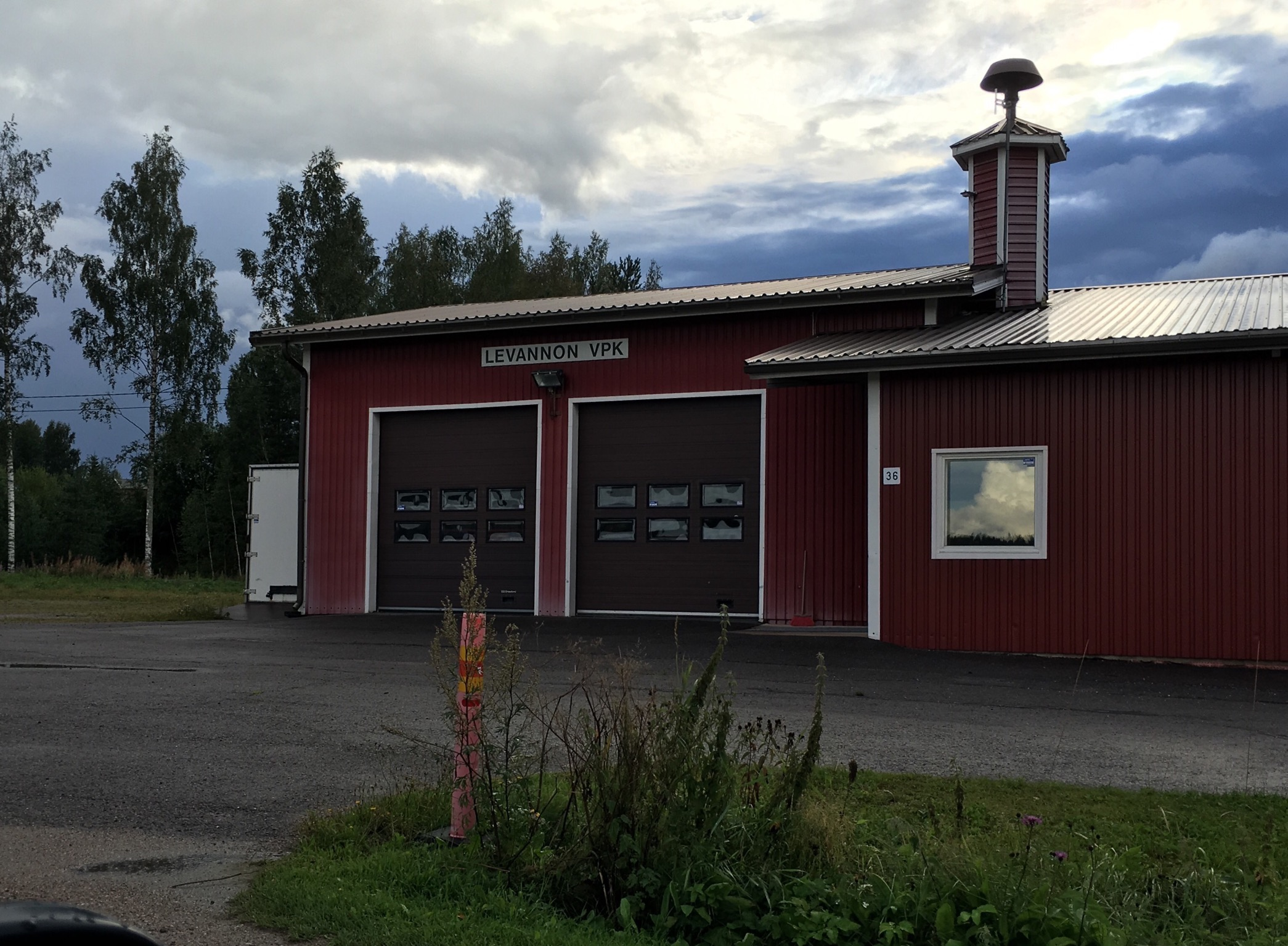 Levannon VPK:n talo